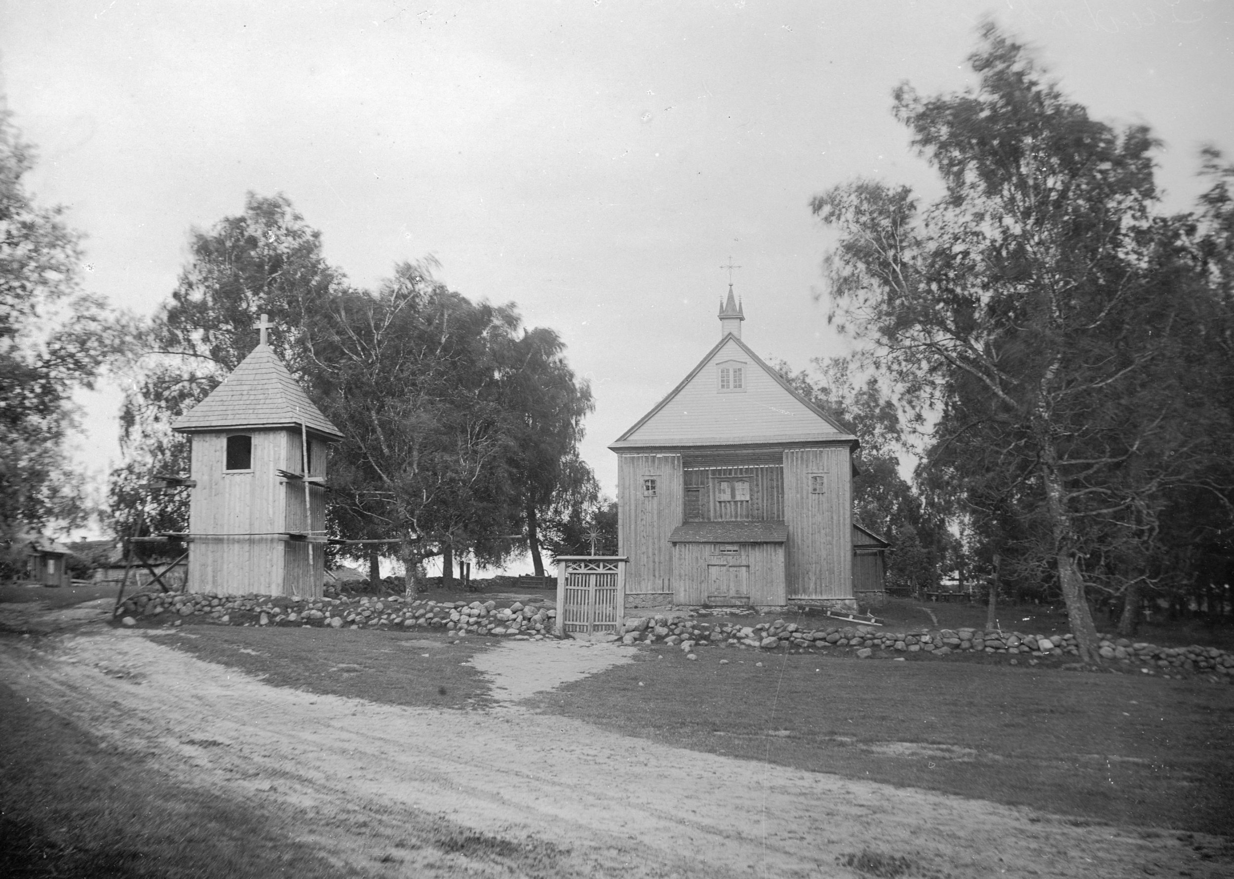 Беларуская (тарашкевіца): Гудагай (Hudahaj). Касьцёл пры кляштары кармэлітаў